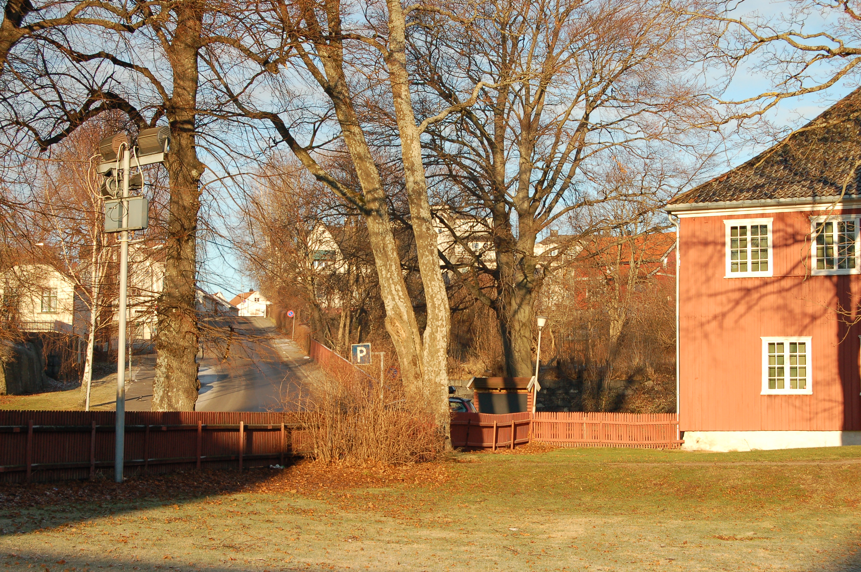 Herregårdsbakken i Larvik - Herregården til høyre